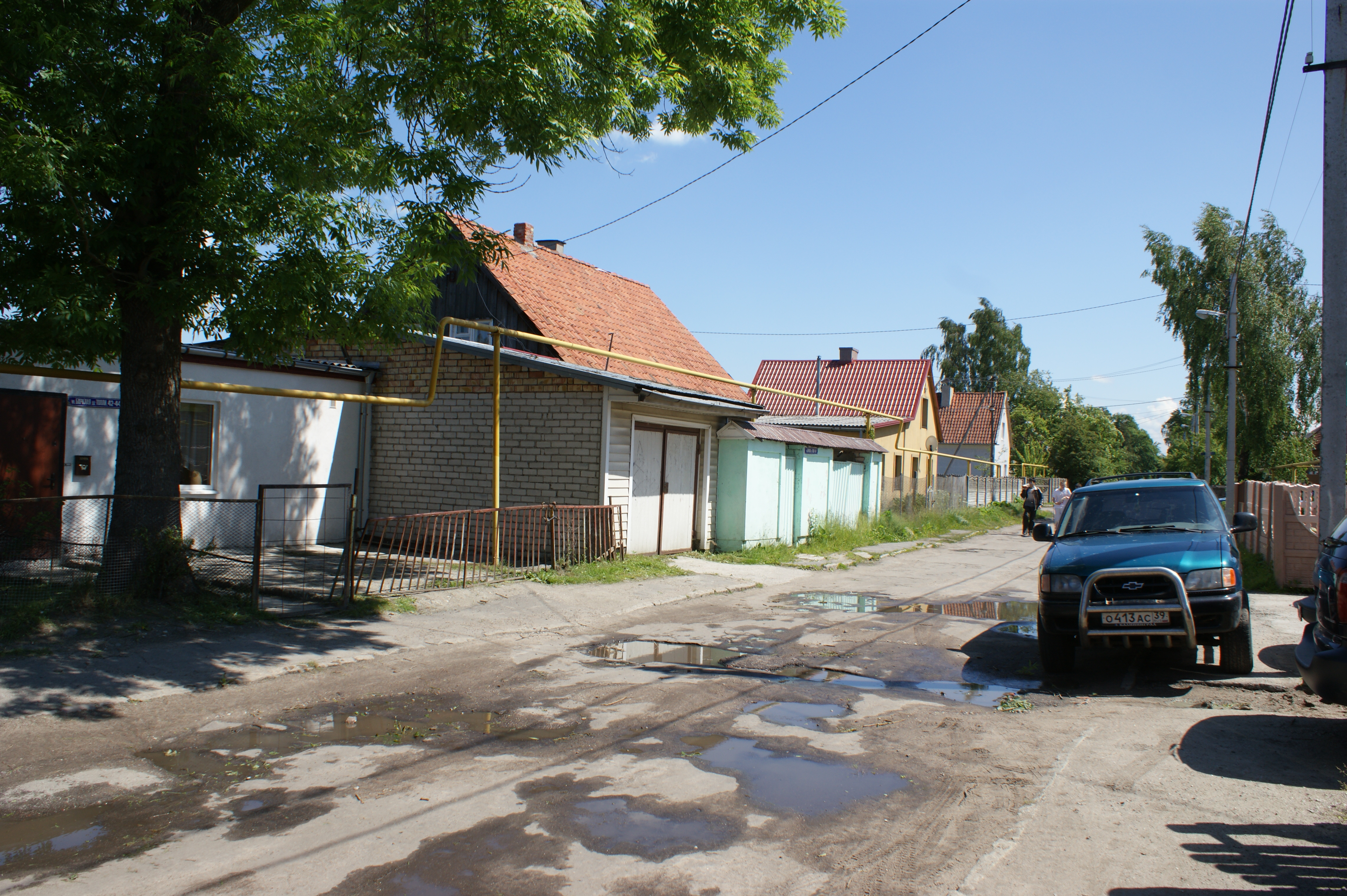 Strassenzustand Lerchenweg im ehemaligen Vorort Rothenstein in Kaliningrad